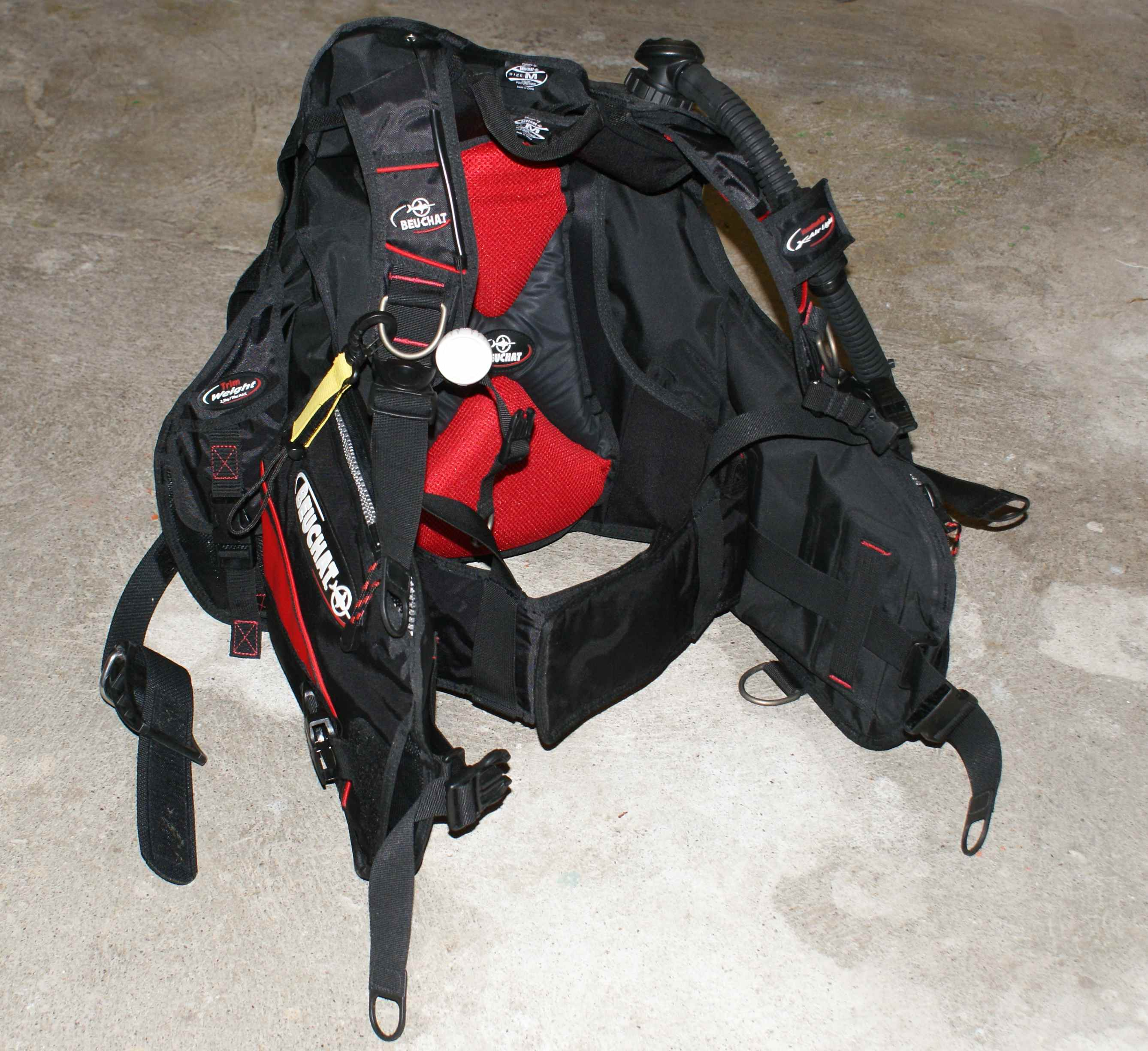 Buoyancy Control Device (BCD) oder Tarierweste; Beuchat Masterlift X-Air Light 2